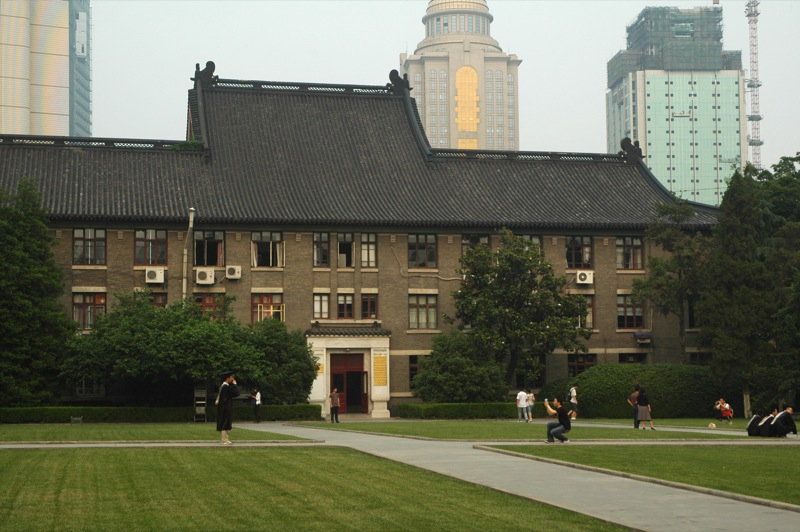 用于南京条目提升，由Hong Kong dear Edward摄于南大，南京大学东大楼，初名科学馆，建于1925年，由美国建筑师司迈尔（A. G. Small）设计。